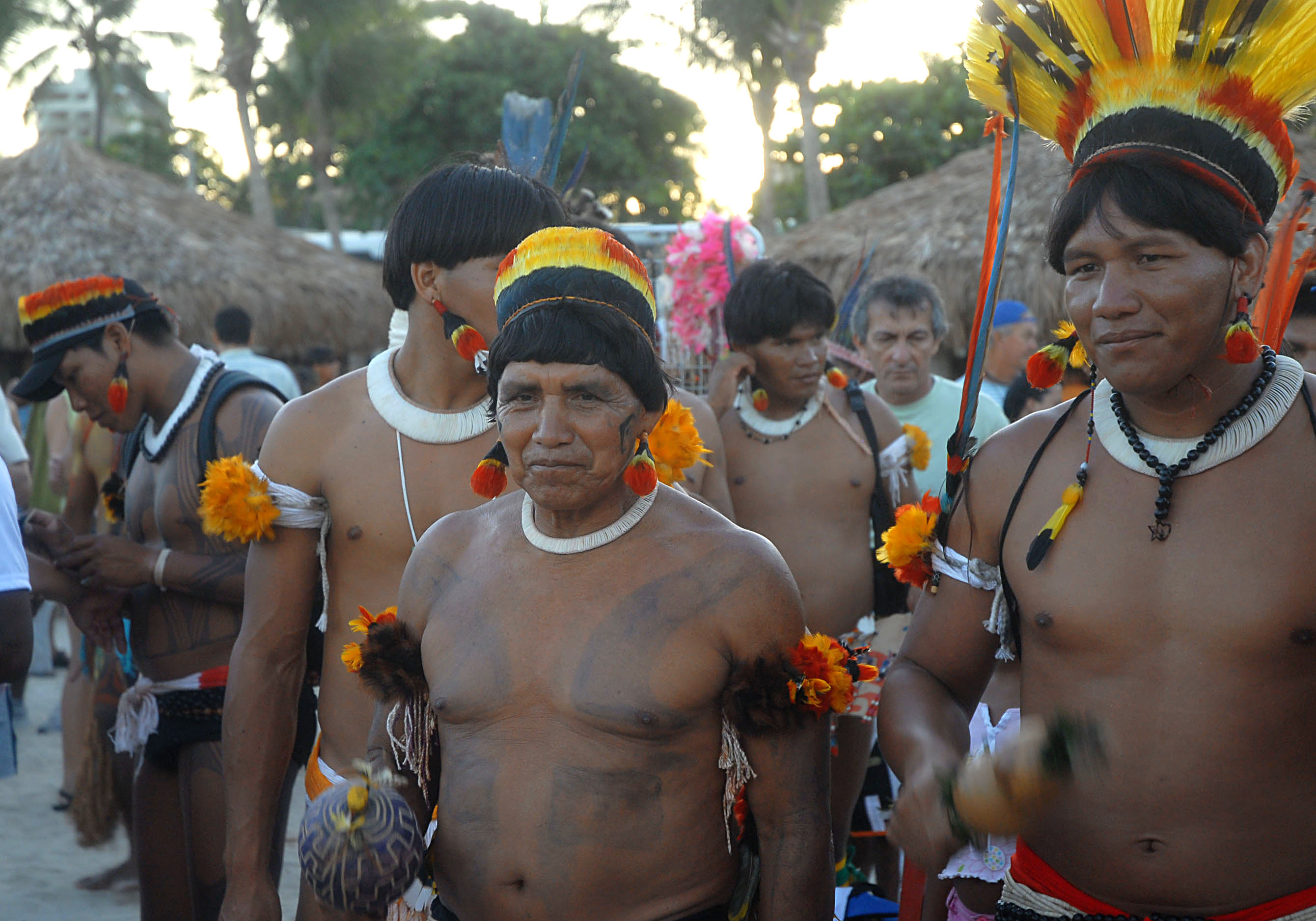 Índios da etnia Kuikuro na cerimônia de encerramento da nona edição dos Jogos dos Povos Indígenas (Olinda PE)